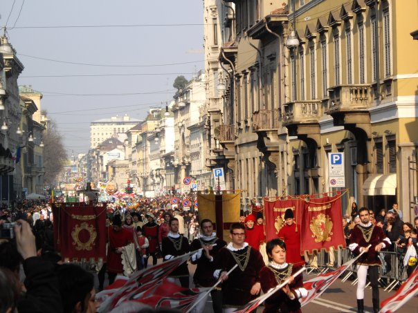 Corteo Storico Carnevale Ambrosiano 2009